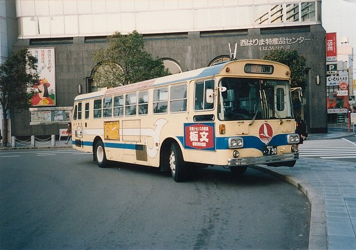 姫路市営バス 旧塗色 姫路駅南口にて